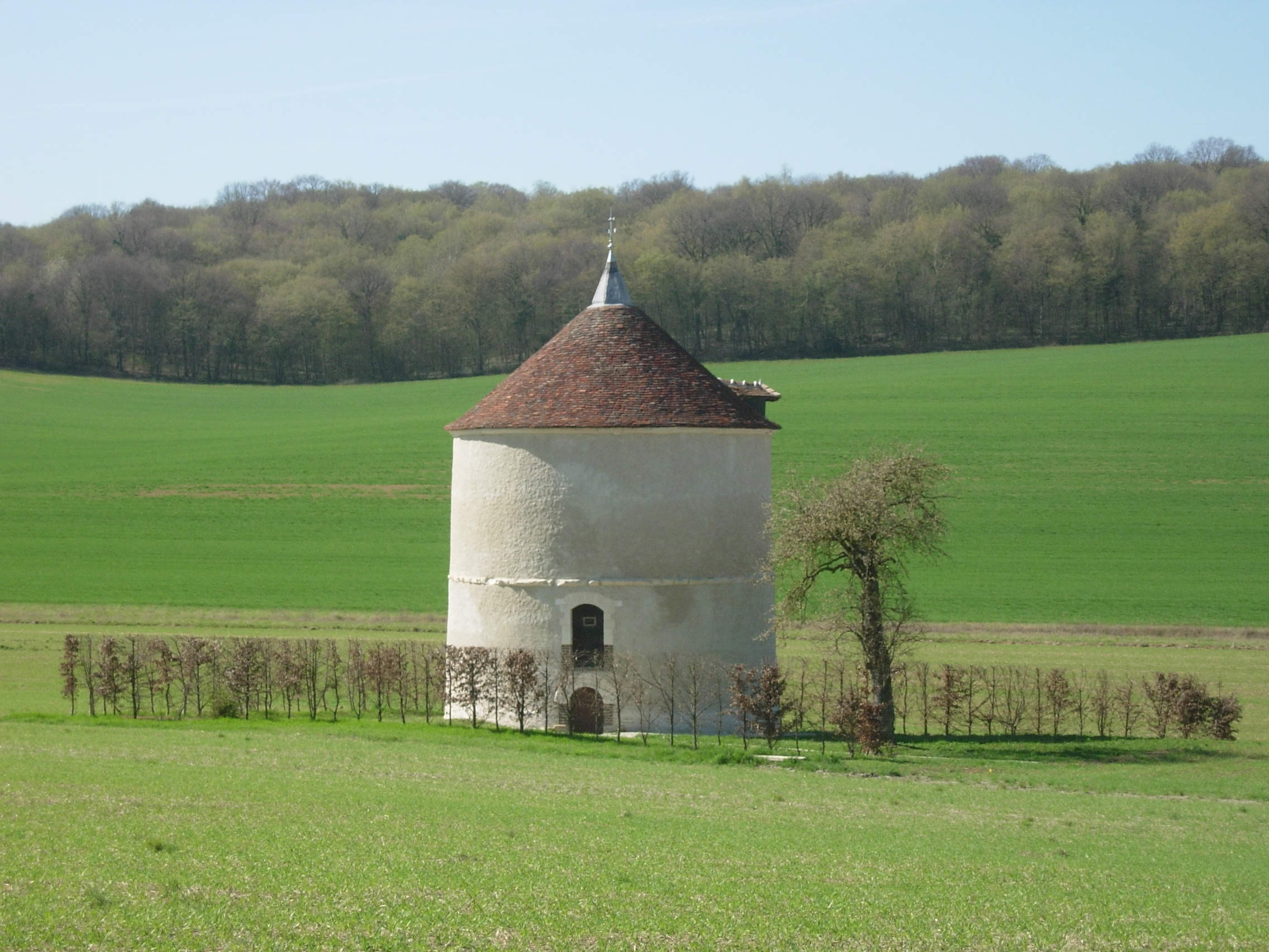 Pigeonnier du Chaast à Vauchassis (Aube)